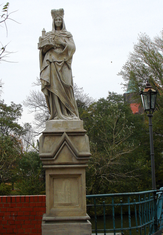 Wrocław, Most Tumski, 1888-1889